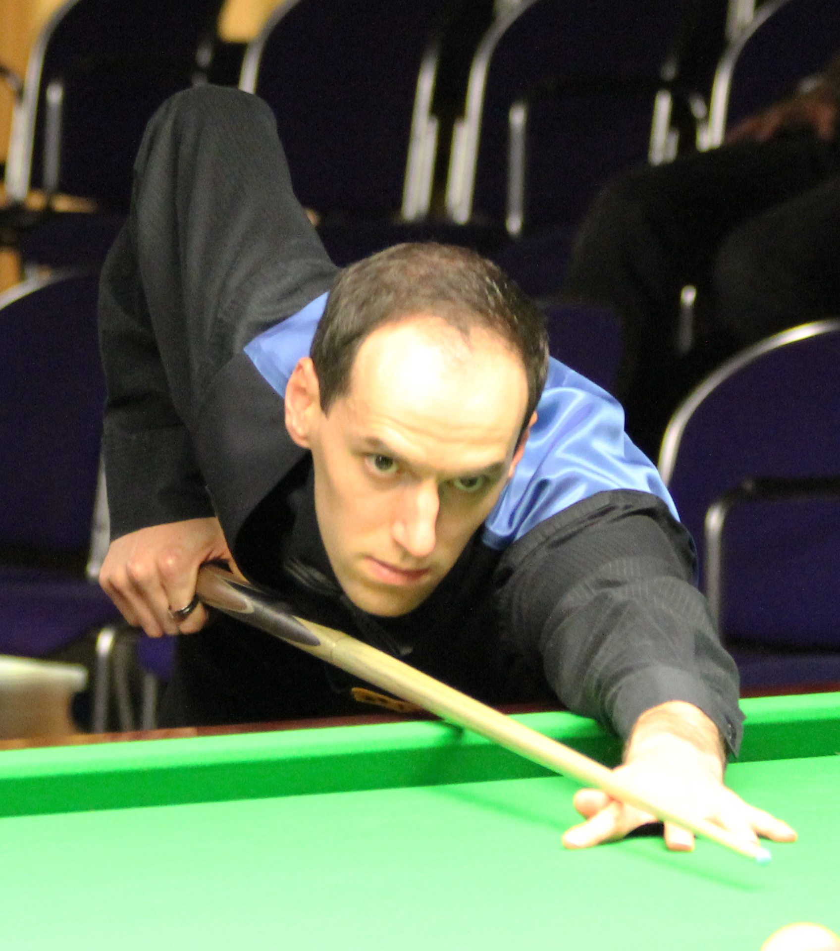 Ian Burns beim Paul Hunter Classic 2012